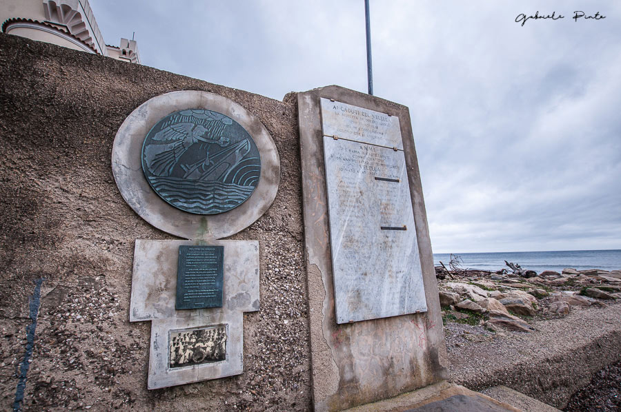 Monumento ai caduti del Sommergibile Velella a Licosa